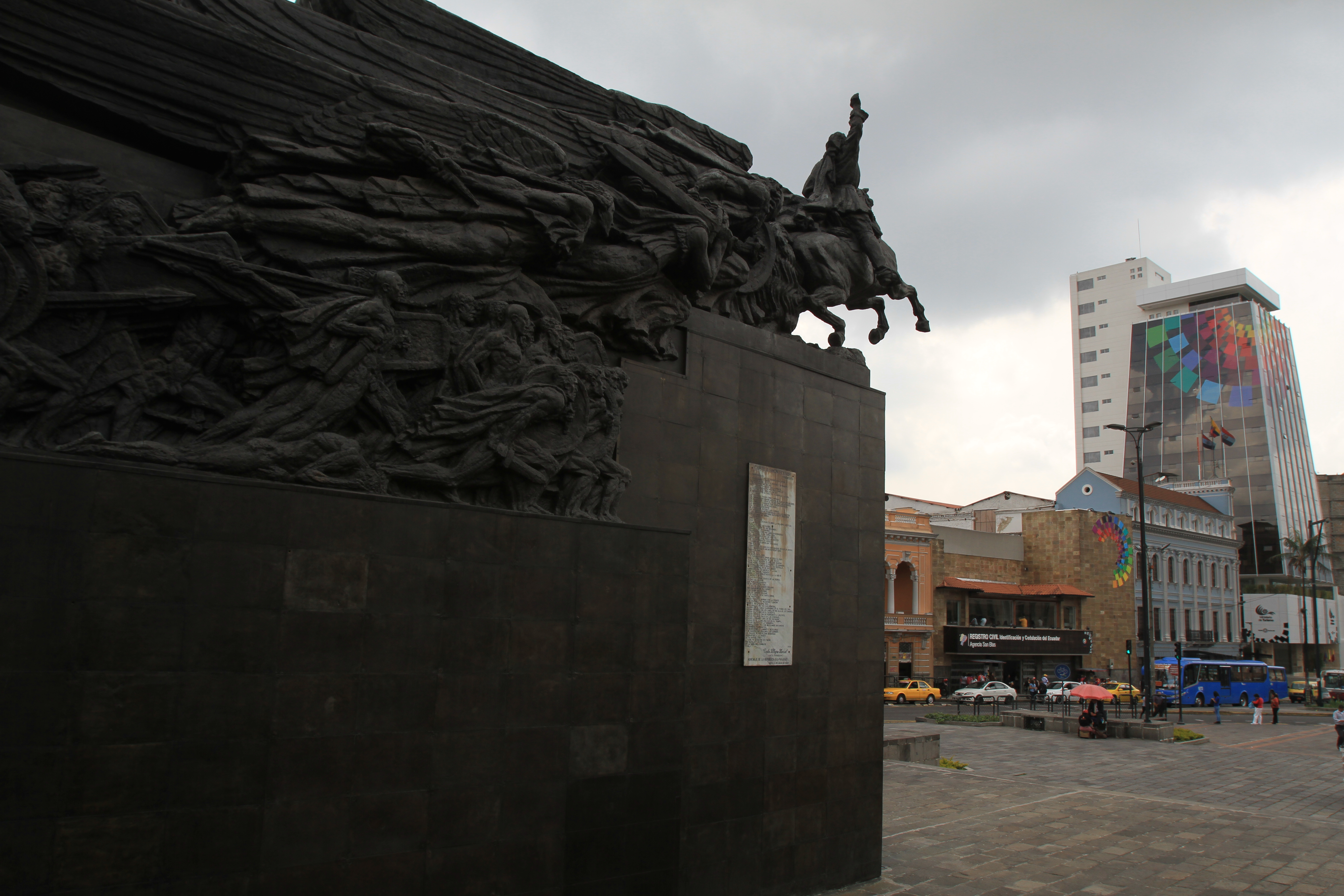 Ministerio de Turismo Edificio La Licuadora (8)